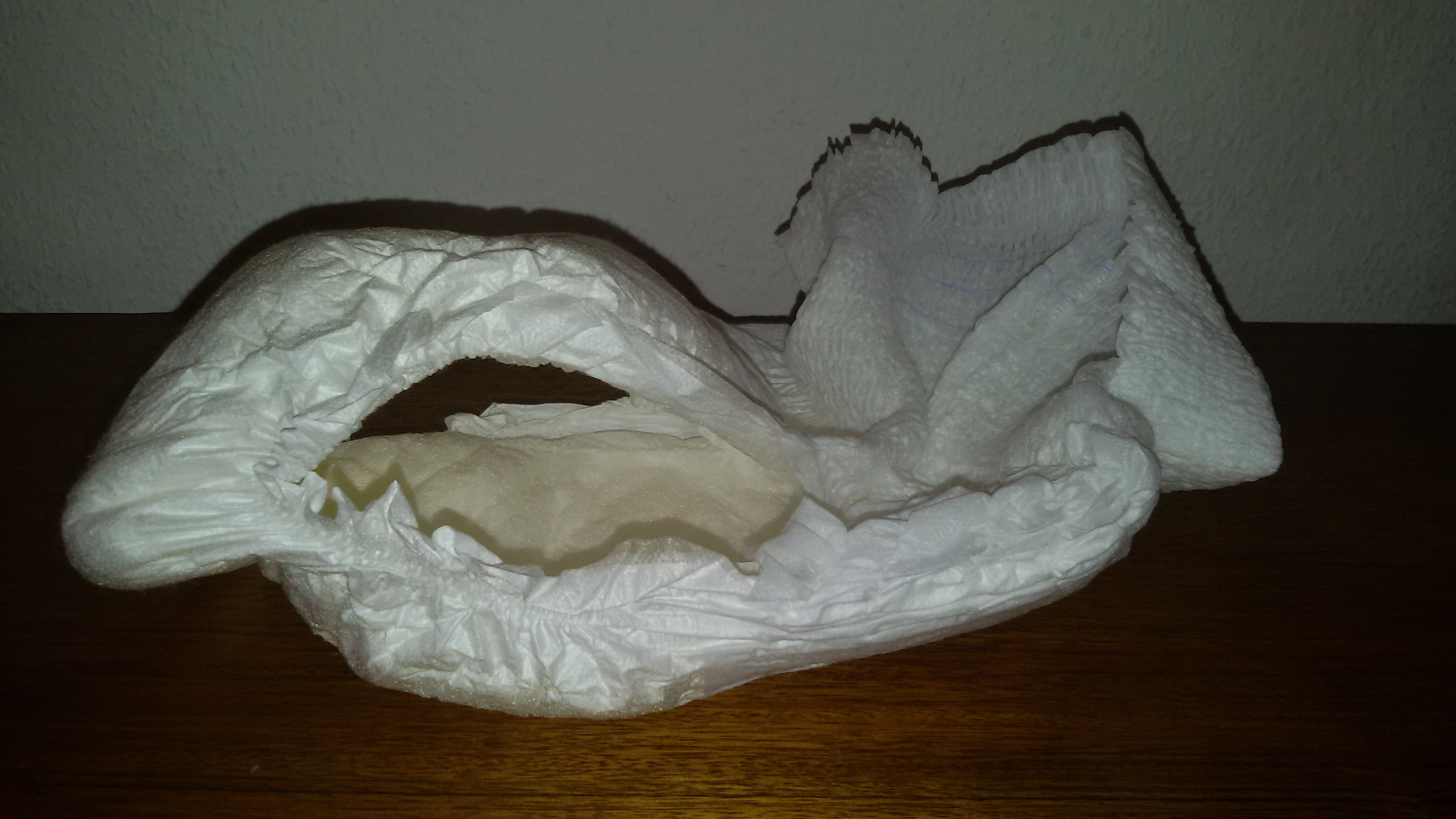 Eine Höschenwindel, vorzugsweise als Inkontinenzpants bezeichnet dient in der Alterspflege und im Krankenwesen zur Vorbeugung des Urin- oder Stuhlauffangens bei Inkontinenz. Mit Bund und hier Blick durch eines der beiden Beinlöcher.